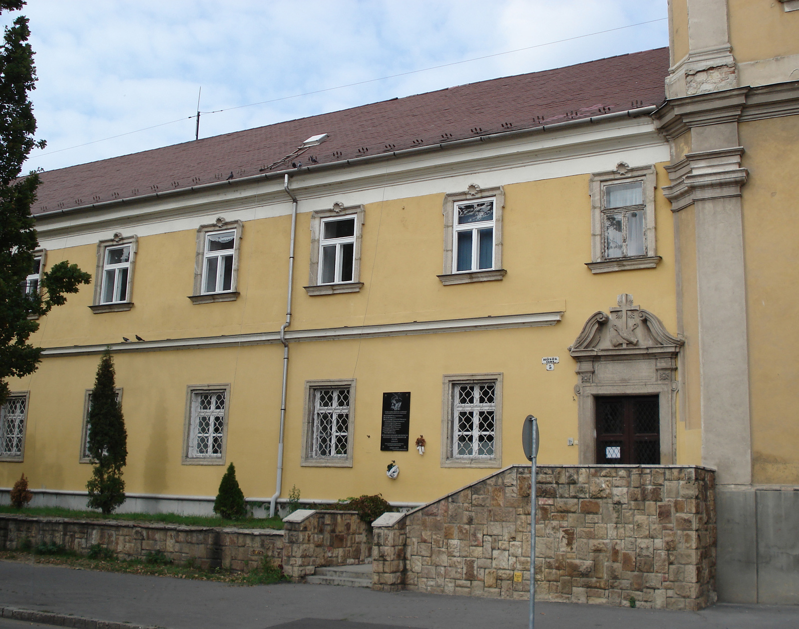 Kollégium, Minorita zárda (Miskolc, Hősök tere 7.) This is a photo of a monument in Hungary, Identifier: 2945